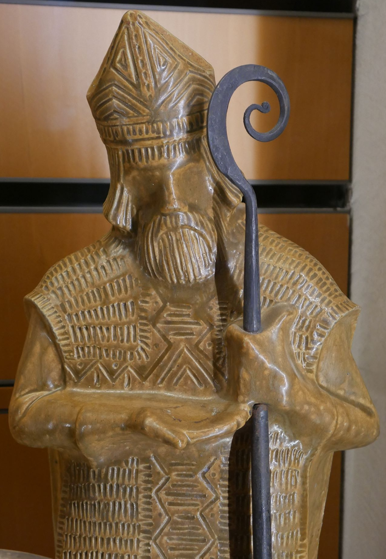 Statuaire en grès moulé et émaillé, décors d'incisions sur la chasuble, une crosse en fer martelé. H. 50.8 l. 21.1 épaisseur. 19.7